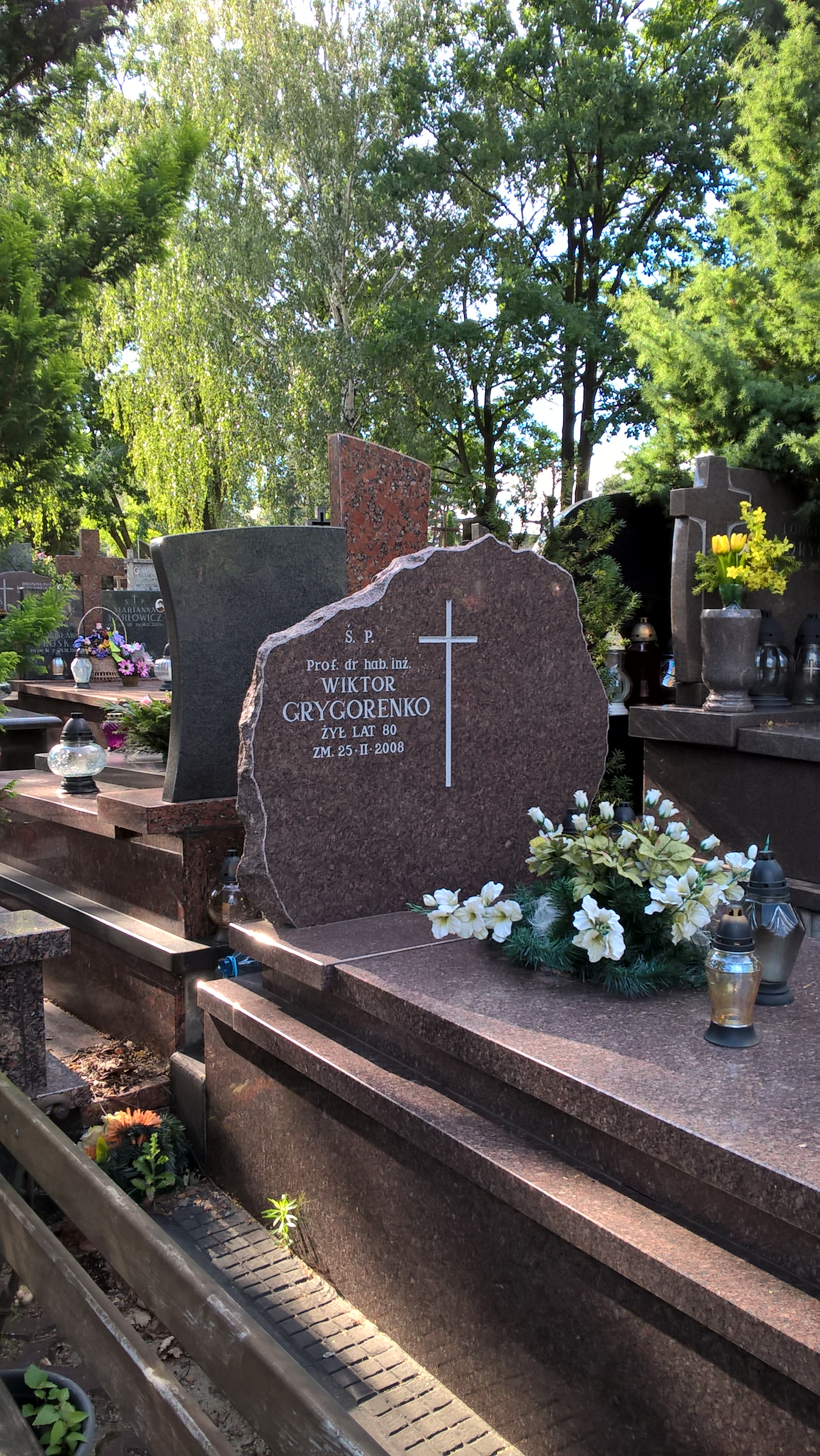 Grób Wiktor Grygorenko na cmentarzu w Starej Miłosnej